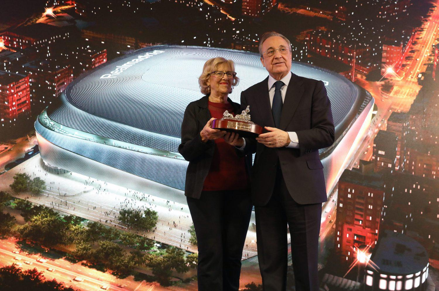 La alcaldesa de Madrid, Manuela Carmena, ha asistido hoy junto al presidente del Real Madrid, Florentino Pérez, a la presentación del proyecto Nuevo Santiago Bernabéu en un acto en el que han estado acompañados del representante del GMP-L35-Ribas, el equipo de arquitectos que ha obtenido el encargo de la remodelación, Tristán López-Chicheri, y los portavoces de los diferentes grupos municipales del PSOE, Ahora Madrid, PP y Ciudadanos.